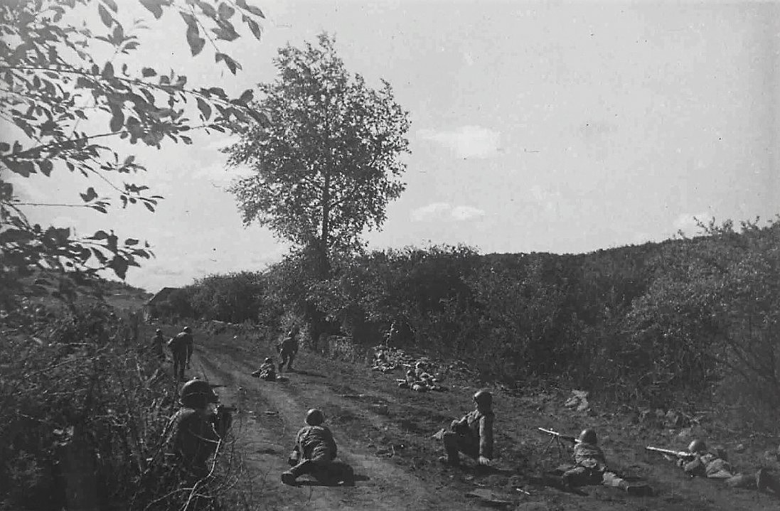 В районе Орджоникидзе (Владикавказ). Автоматчики морской пехоты ведут бой за населённый пункт